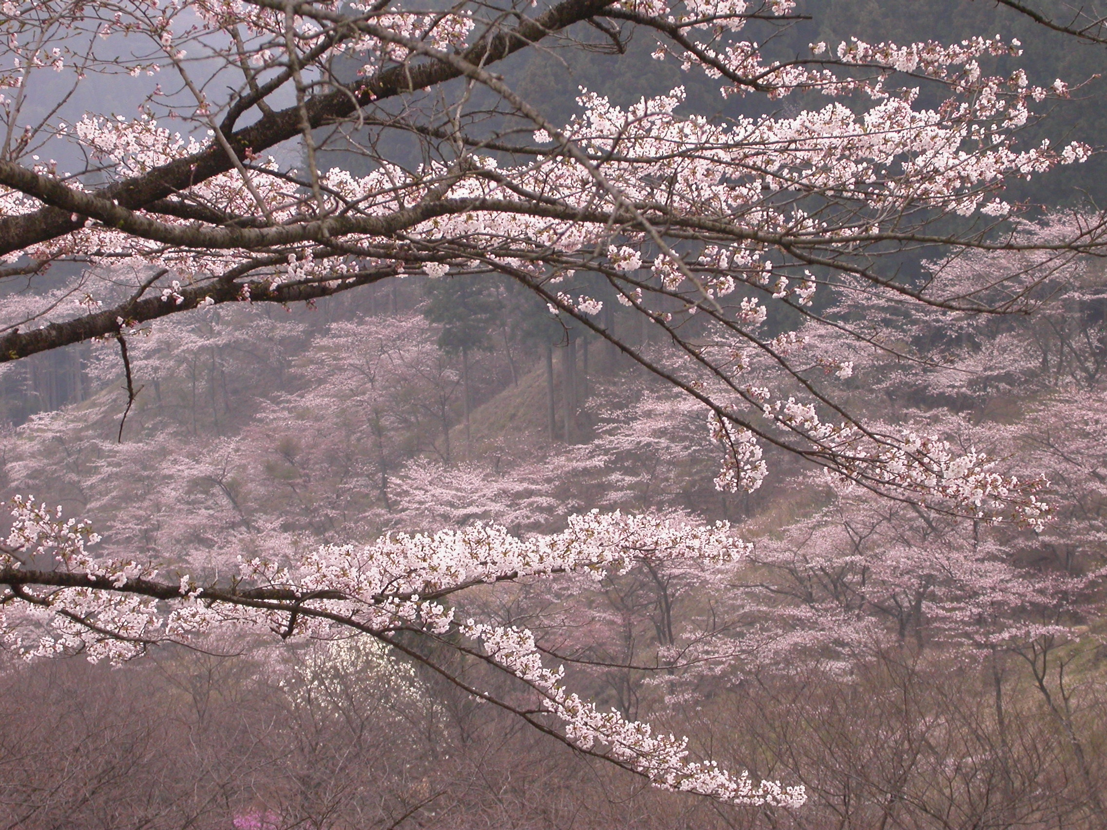 Myogisan Sakurano Sato